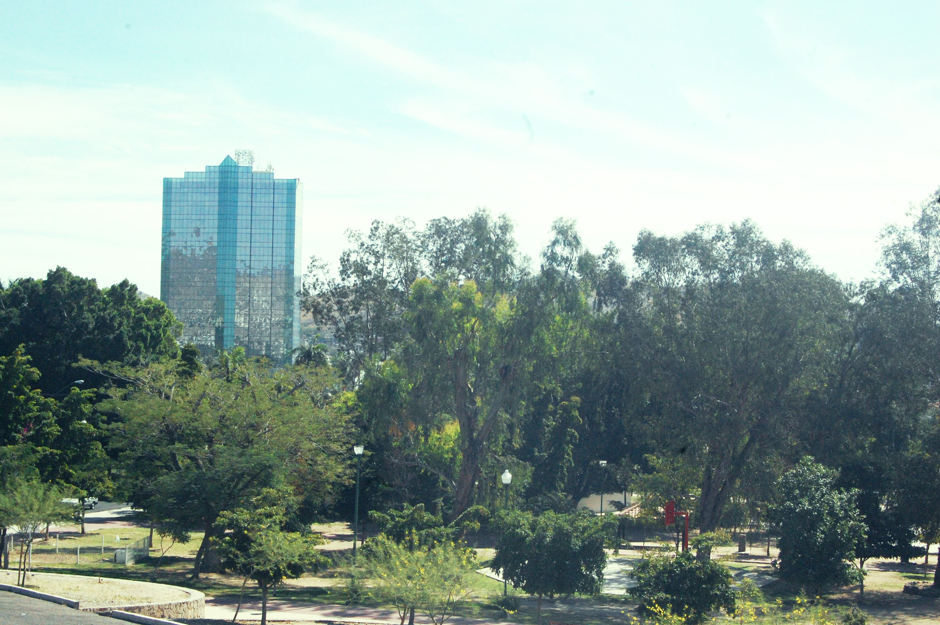 Torre Hermosillo desde parque pitic Autor: WM Jimenez